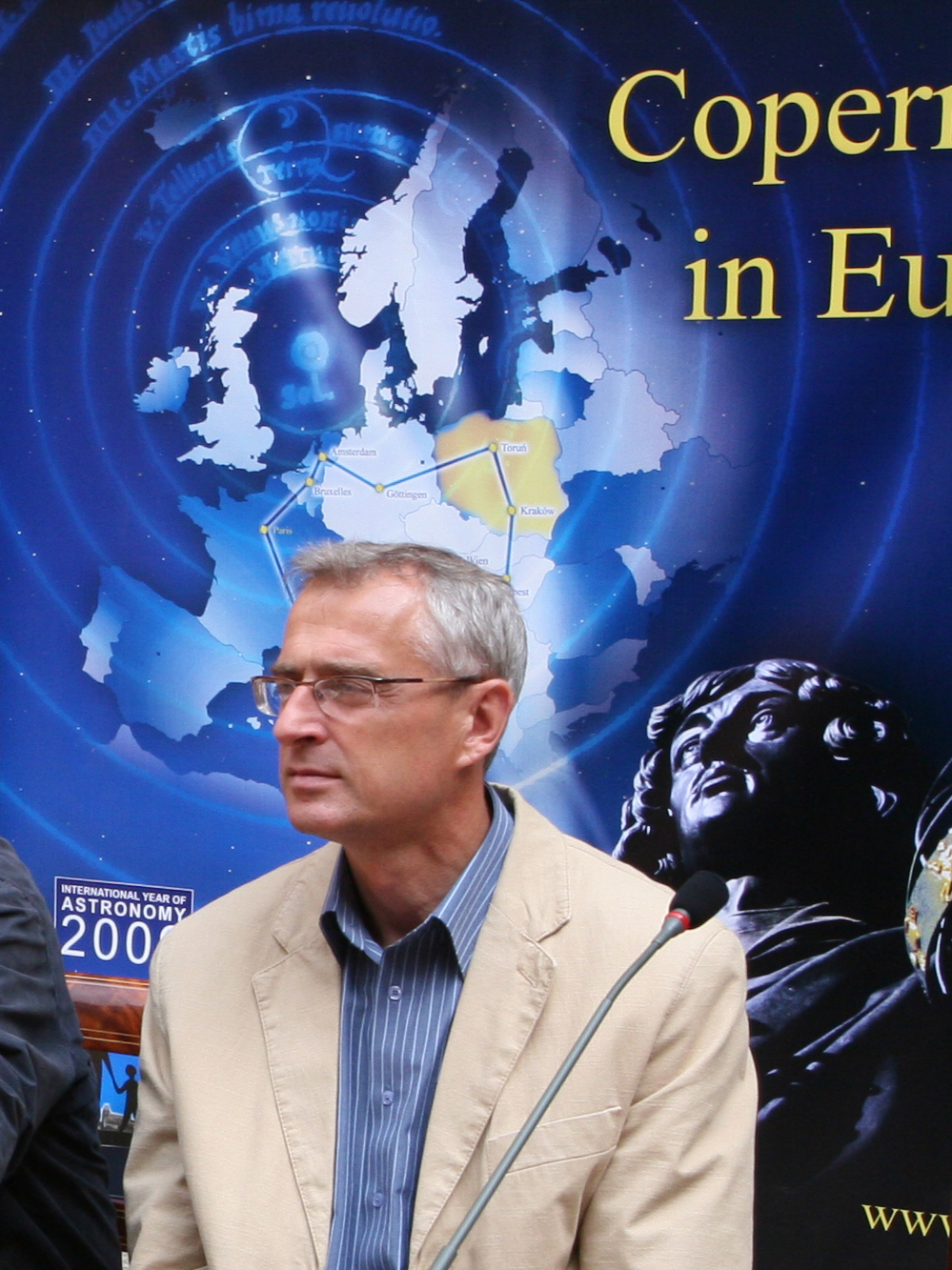 Historyk Lucjan Broniewicz. Konferencja prasowa przed akcją Kopernik w Europie